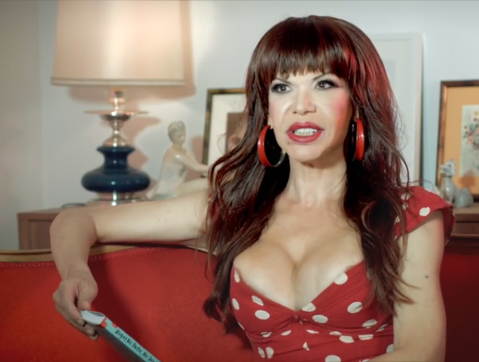 ¡Digo! Ni Puta Ni Santa. Las memorias de La Veneno, la entrevista El libro de las memorias de la Veneno Realizado por Fidel Lorite Iluminación: Mista Louis Maquillaje y peluquería: Roberto Peña Grabado en Mista Studio.